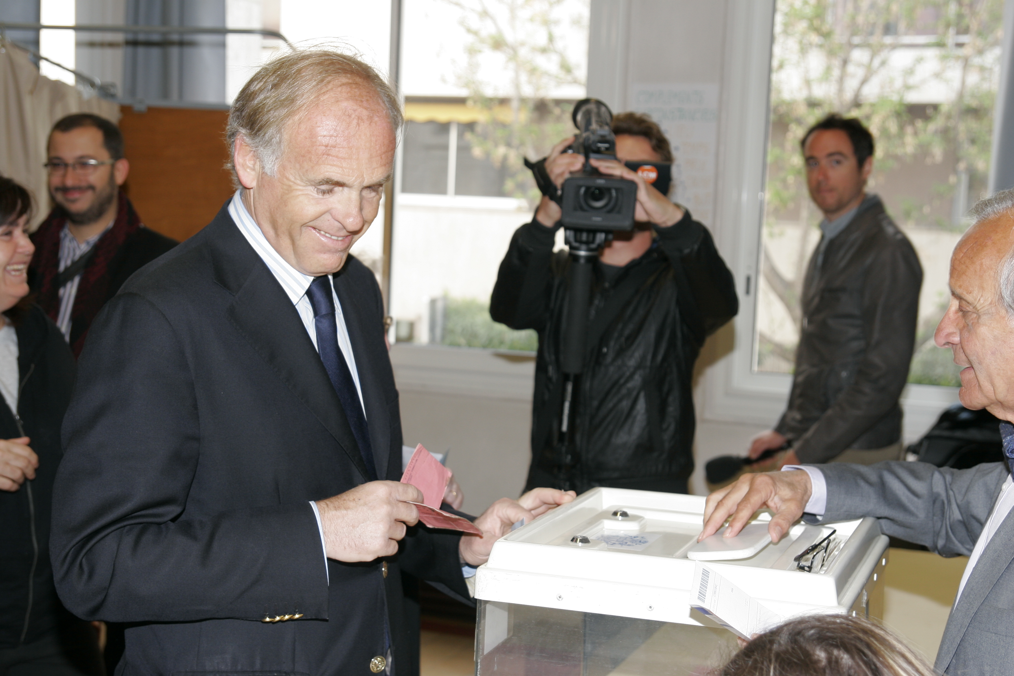 Dominique Tian dans un bureau de vote à Marseille lors du premier tour de l'élection présidentielle 2012